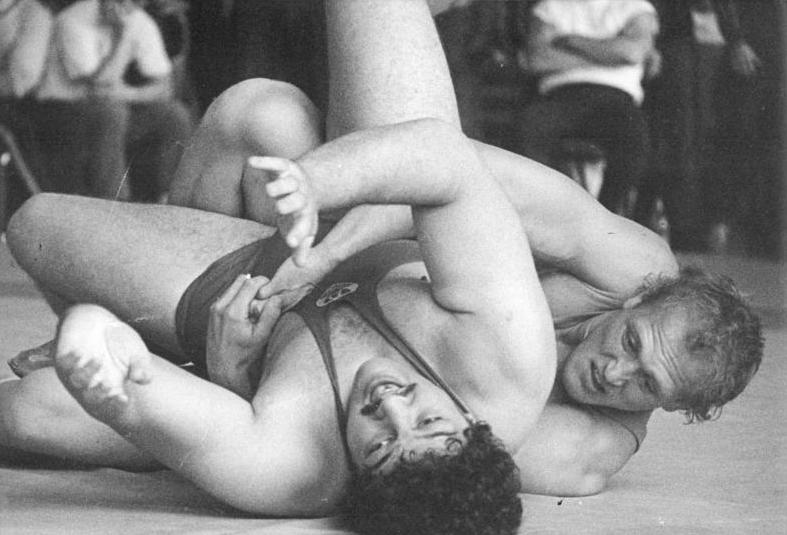 Andreas Schröder, Matthias Heinrich ADN-ZB Kasper 17.6.88 Jena: DDR-Meisterschaften im Ringen-Finale Klassisch-schwerste Klasse Nach Punkten unterlag Andreas Schröder (r., SC Motor Jena) dem Dynamoringer Matthias Heinrich aus Luckenwalde (130 Kilogramm).